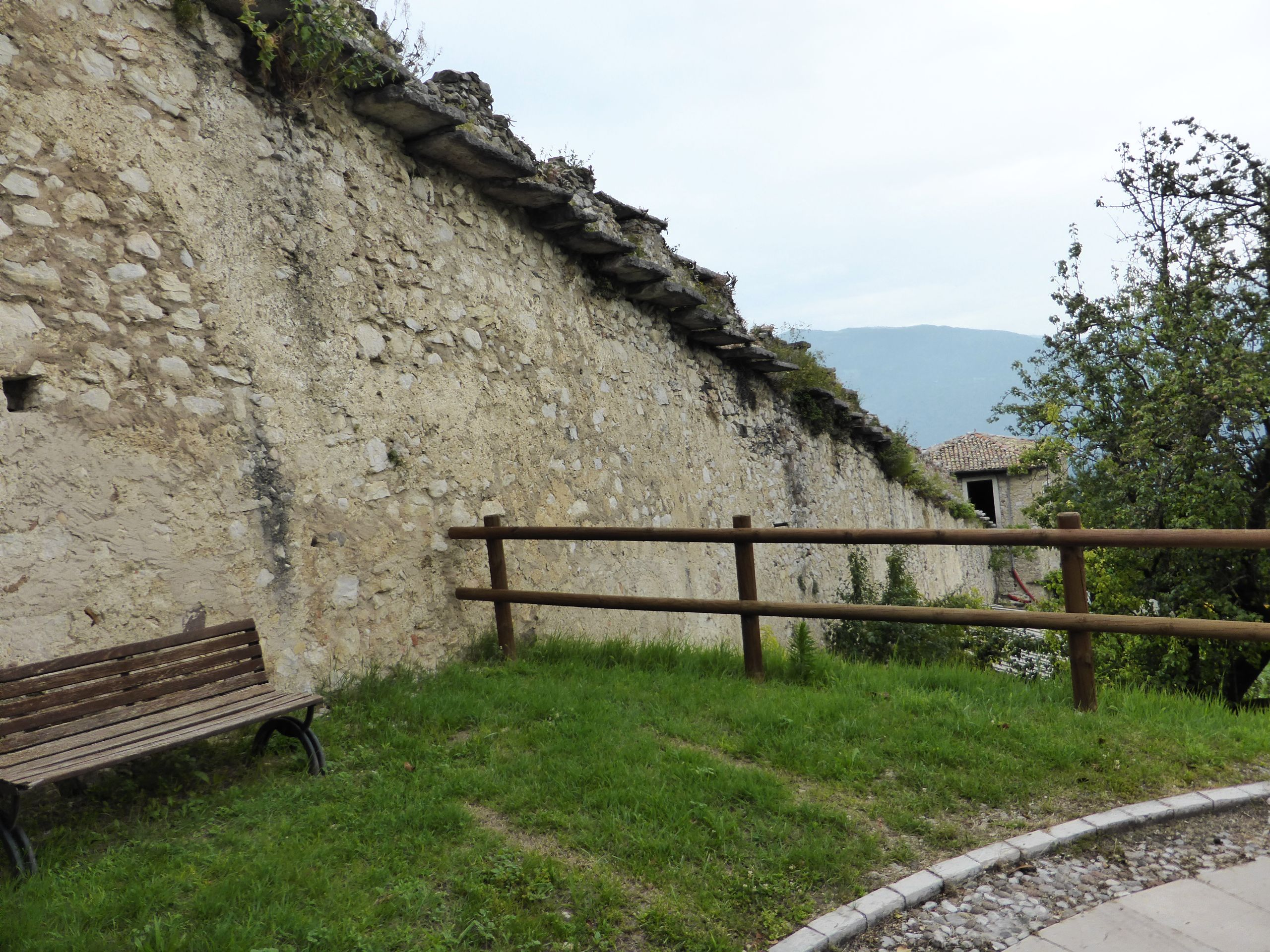 Schloss Castellano